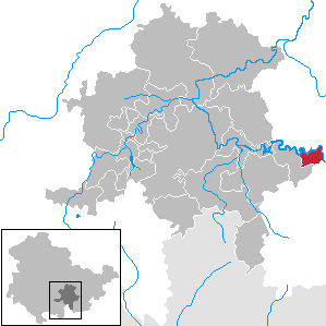 Altenbeuthen in Thuringia - District Saalfeld-Rudolstadt